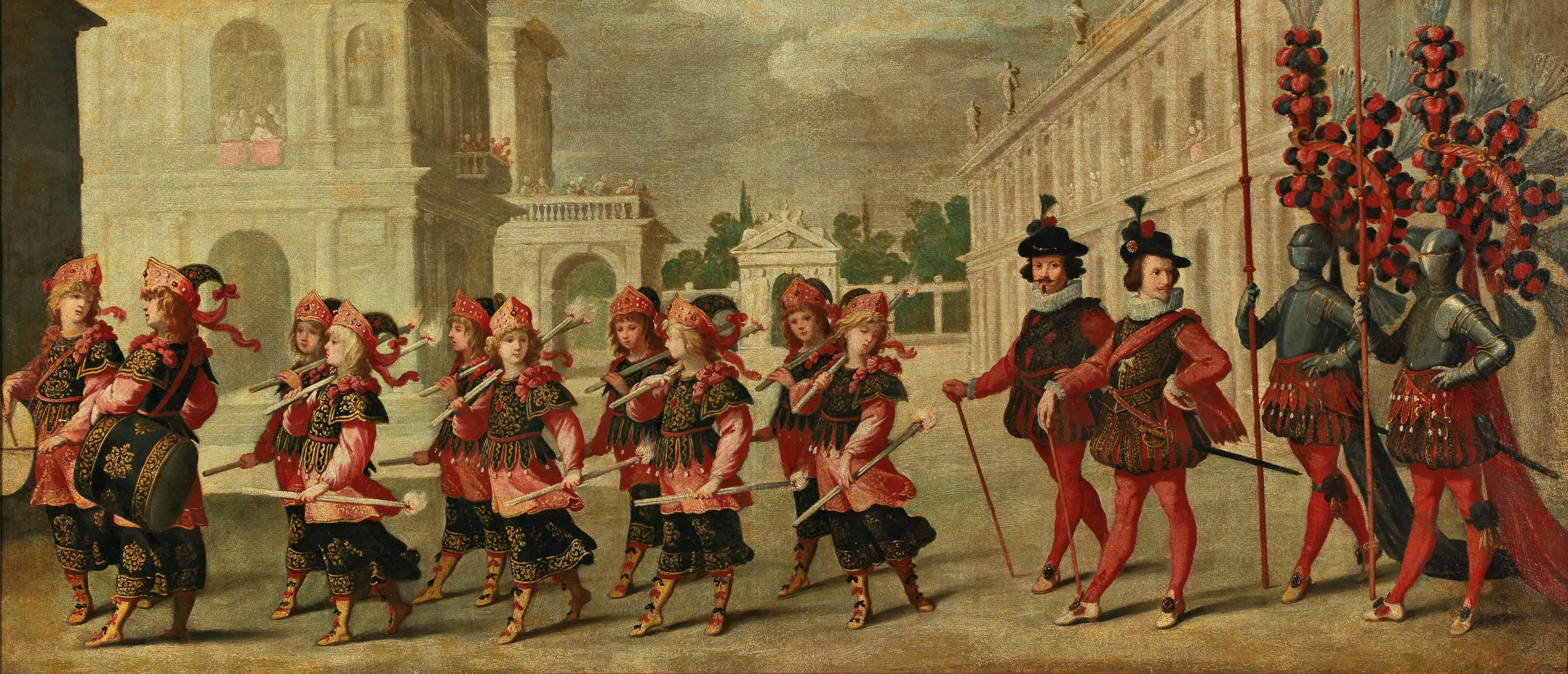 Habsburger Hofmaler um 1600-20: ein Triumphzug mit Rittern des Orden von Malta und des Ordens von Santiago de Compostela, Rittern in Prunkrüstung und muszizierenden Knaben, Öl auf Leinwand, 73 x 192 cm, Provenienz: HG the Dowager Duchess of Bedford, Woburn Abbey, Bedfordshire Auktion Sotheby’s, London, Dezember 2003, Lot 9 möglicherweise Entwurf zu einem Wandteppich, womöglich ein Zug für eine Hochzeit im Hause Habsburg (etwa Erzherzog Ferdinand II. mit Anna Caterina Gonzaga 1582 in Innsbruck, oder Cosimo II. mit Maria Magdalena von Österreich 1608 in Florenz)